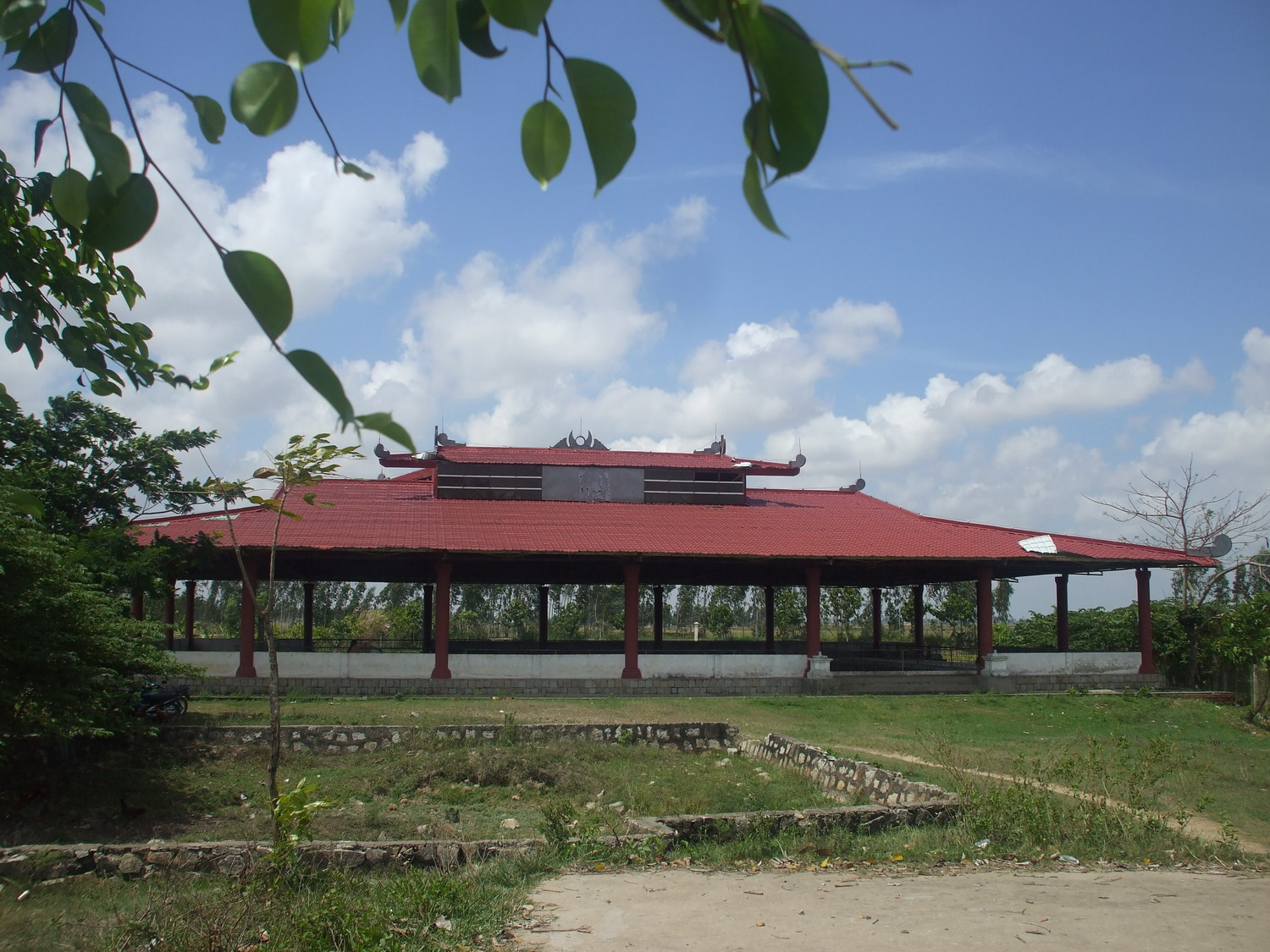 Nhà trưng bày di chỉ Gò Cây Thị (một trong những di chỉ thuộc nền văn hóa Óc Eo) ở thị trấn Óc Eo, huyện Thoại Sơn, An Giang, Việt Nam.